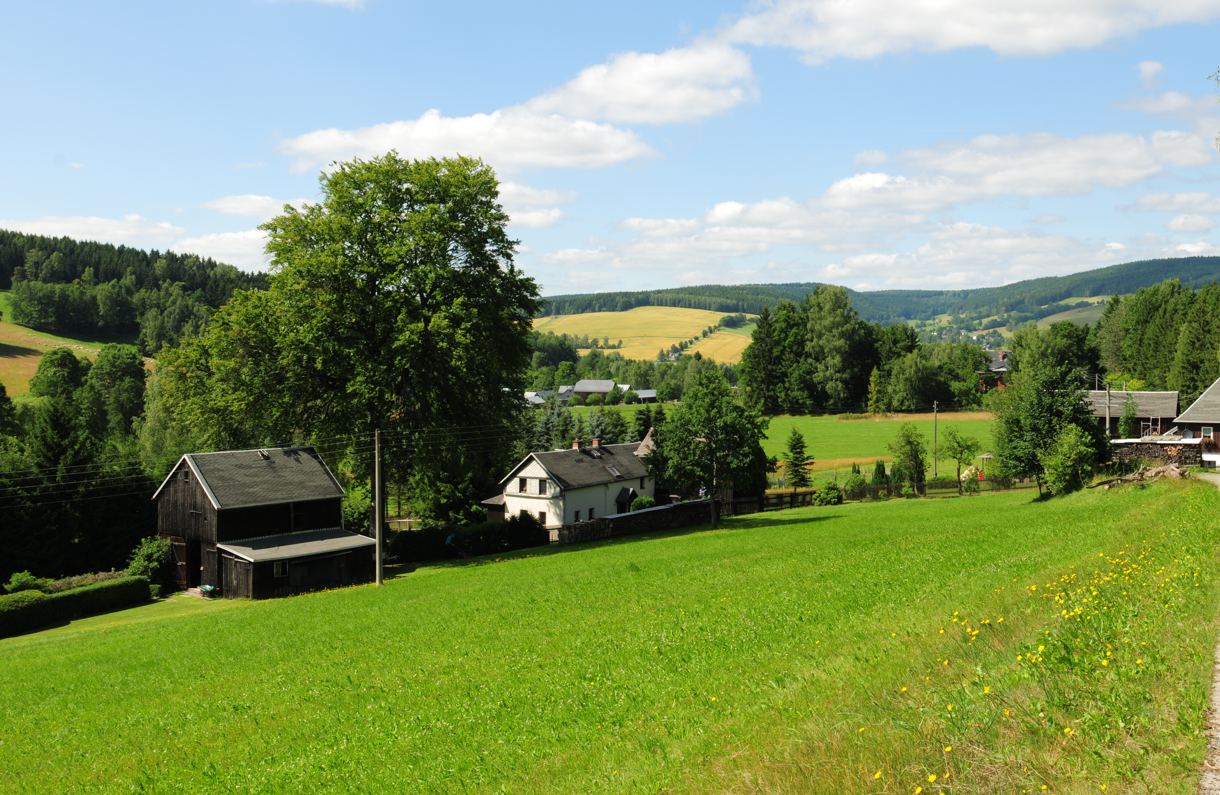 Markneukirchen, Ortsteil Eubabrunn (Vogtlandkreis, Sachsen, Deutschland)